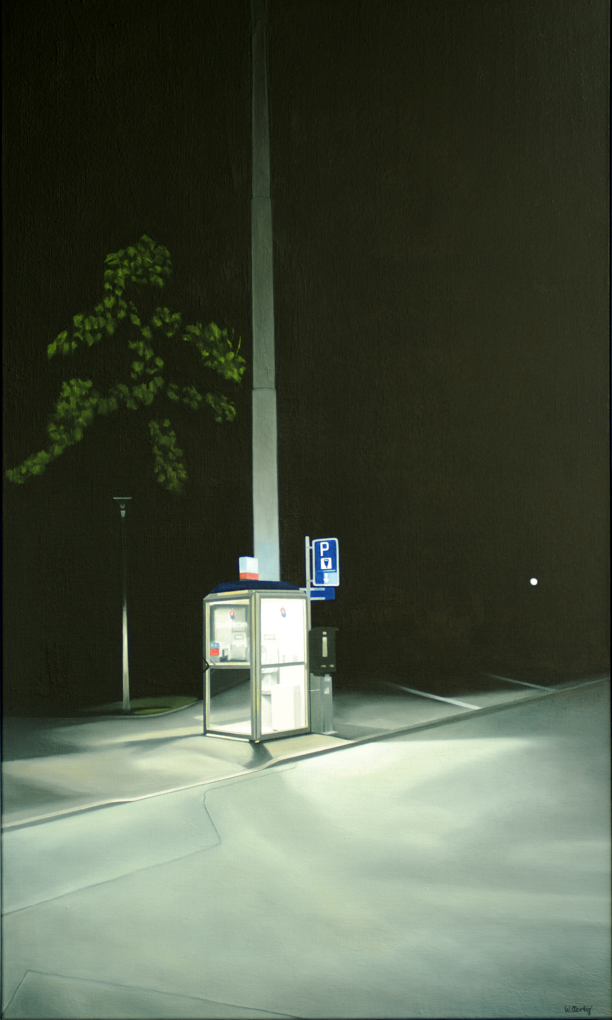 Willi Oertig: Telefonkabine Locarno, 2013, Öl auf Leinwand, Privatbesitz.